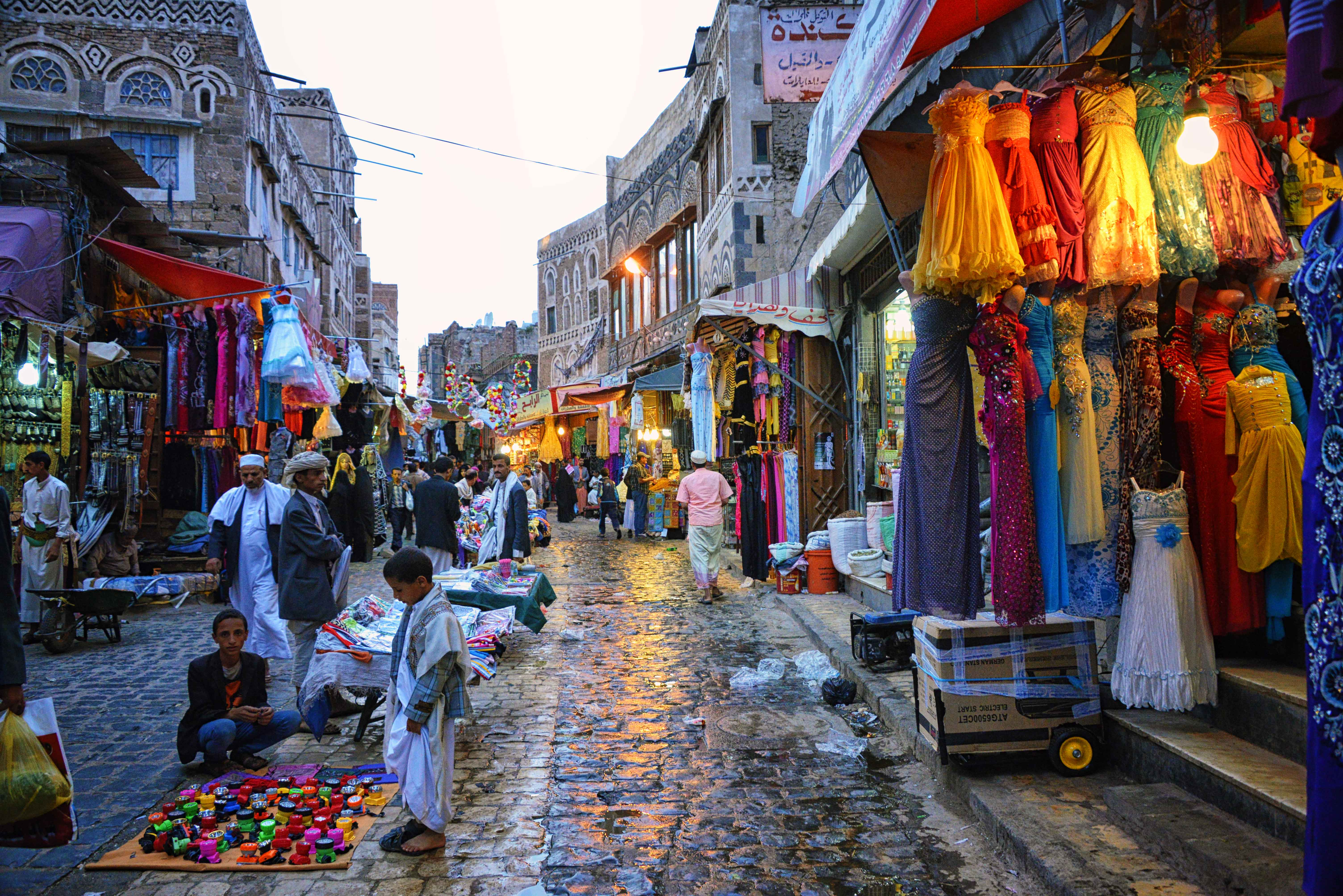 Yemen